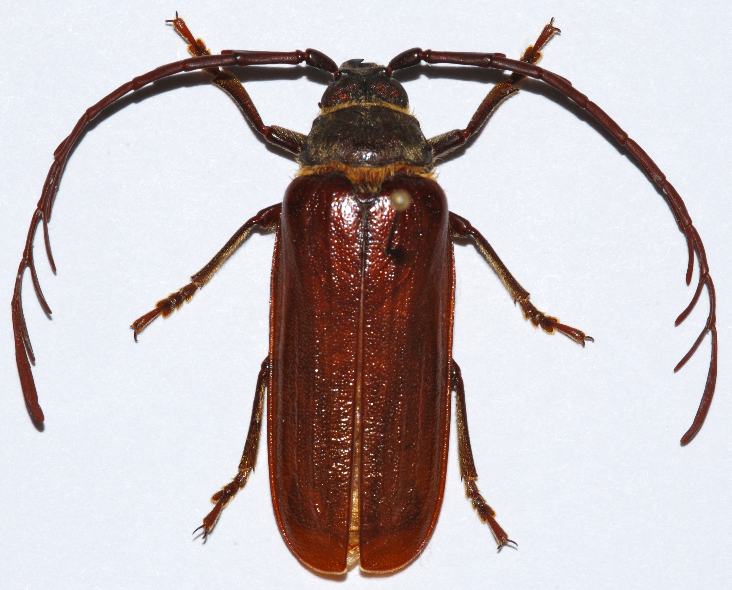 Moramanga, MADAGASCAR